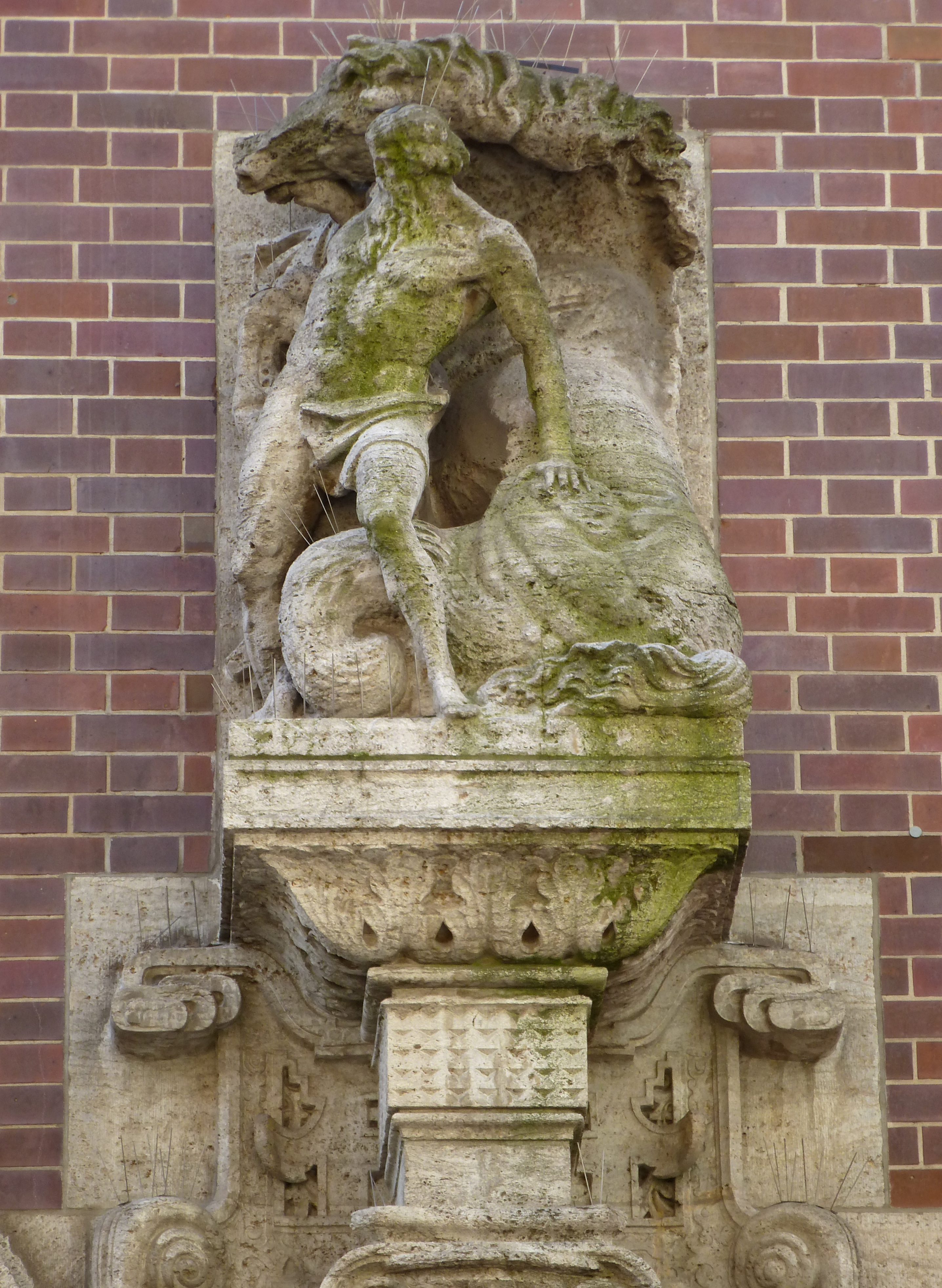 Disconto-Bank, Passage - Kontorhaus am Markt in Bremen, Langenstraße 2; Portal NordseiteDas abgebildete Objekt ist ein geschütztes Kulturdenkmal in der Freien Hansestadt Bremen, mit der Nr. 0830 beim Landesamt für Denkmalpflege registriert.